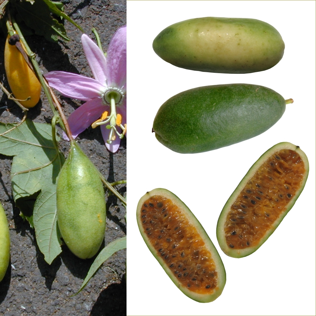 Grafika podręcznika Wikijunior:Owoce. Kuruba (Passiflora tarminiana i Passiflora tripartita var. mollissima).